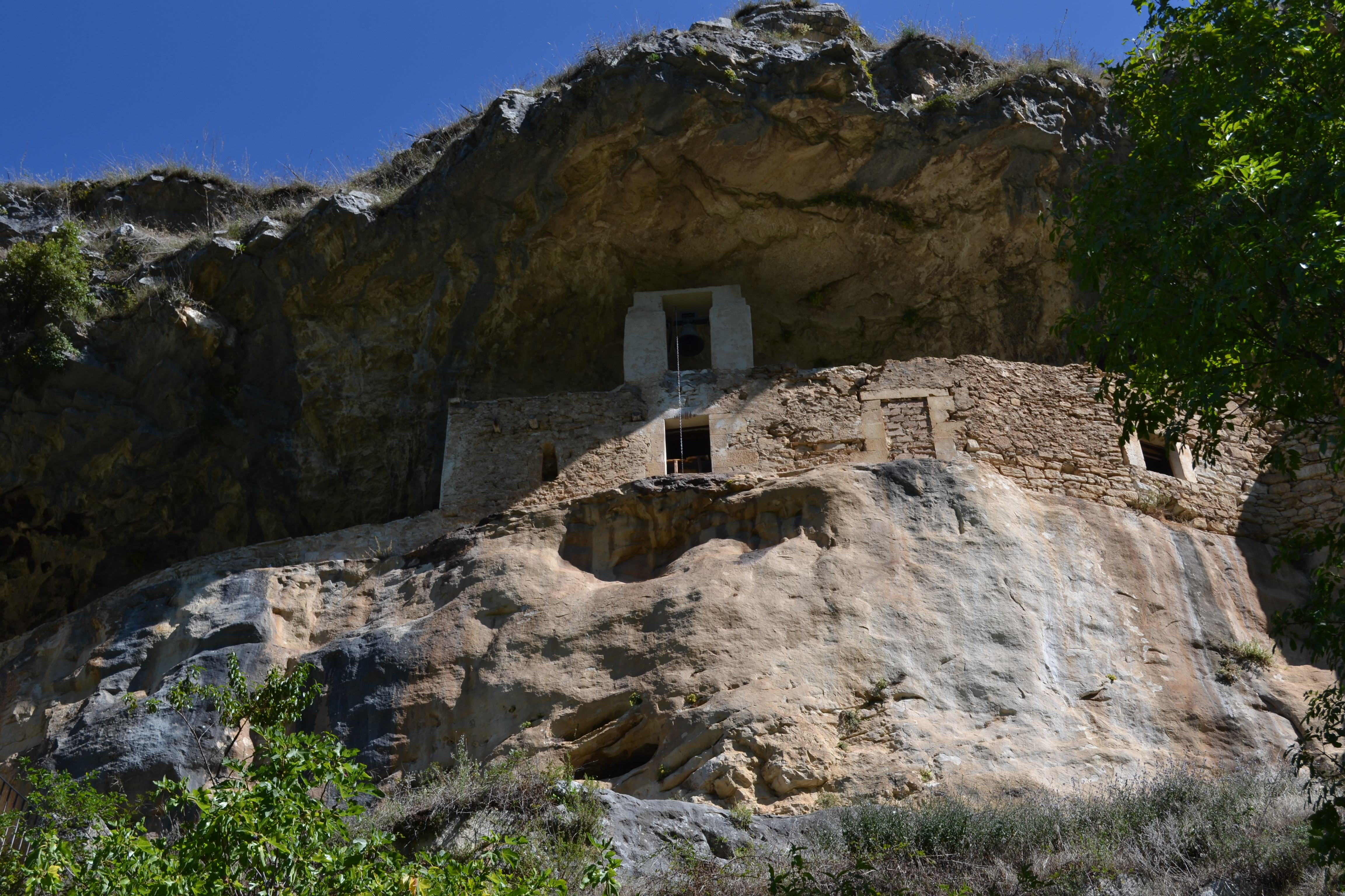 Eremo di San Bartolomeo in Legio, presso Roccamorice